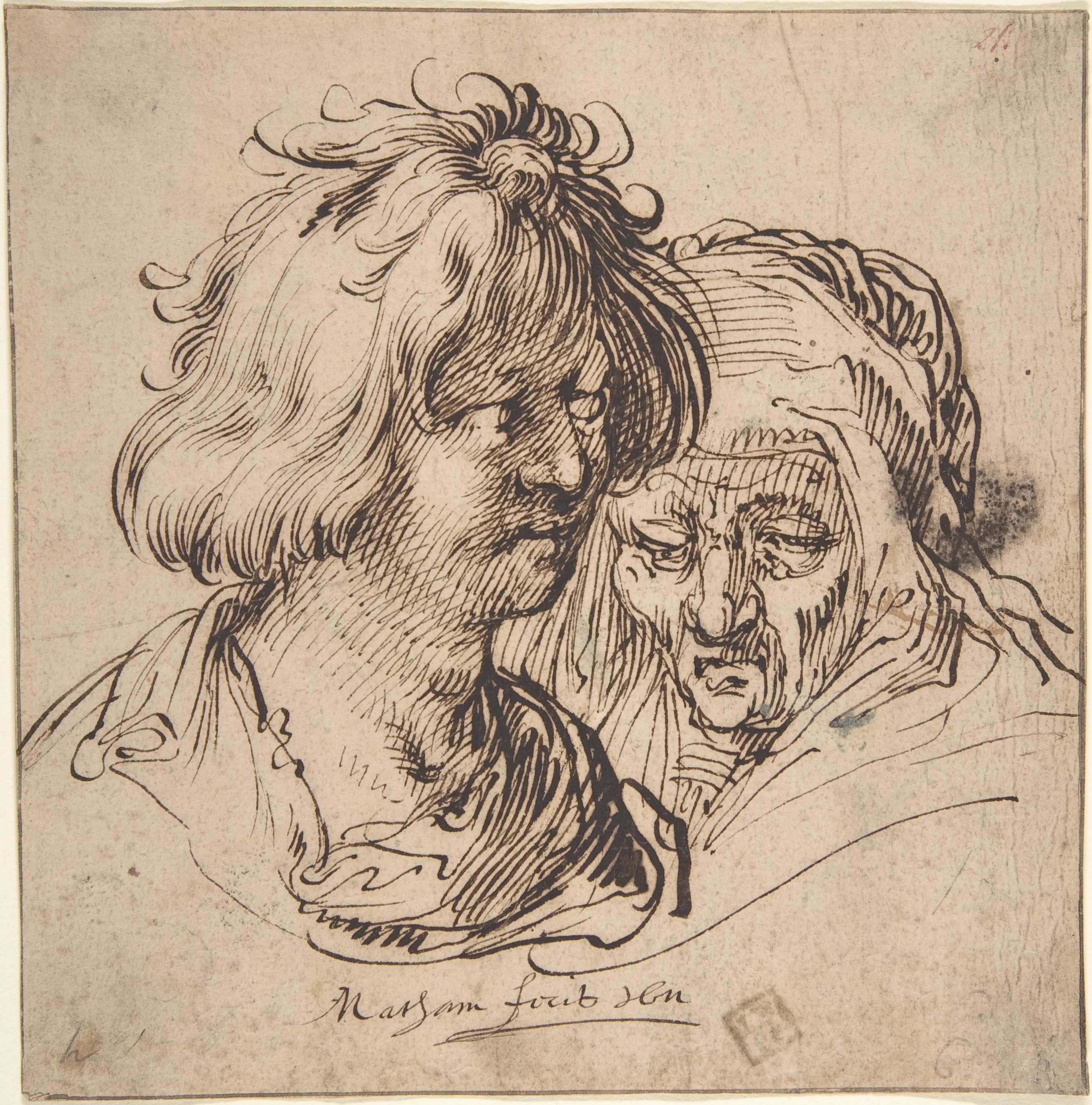 Drawing; Drawings